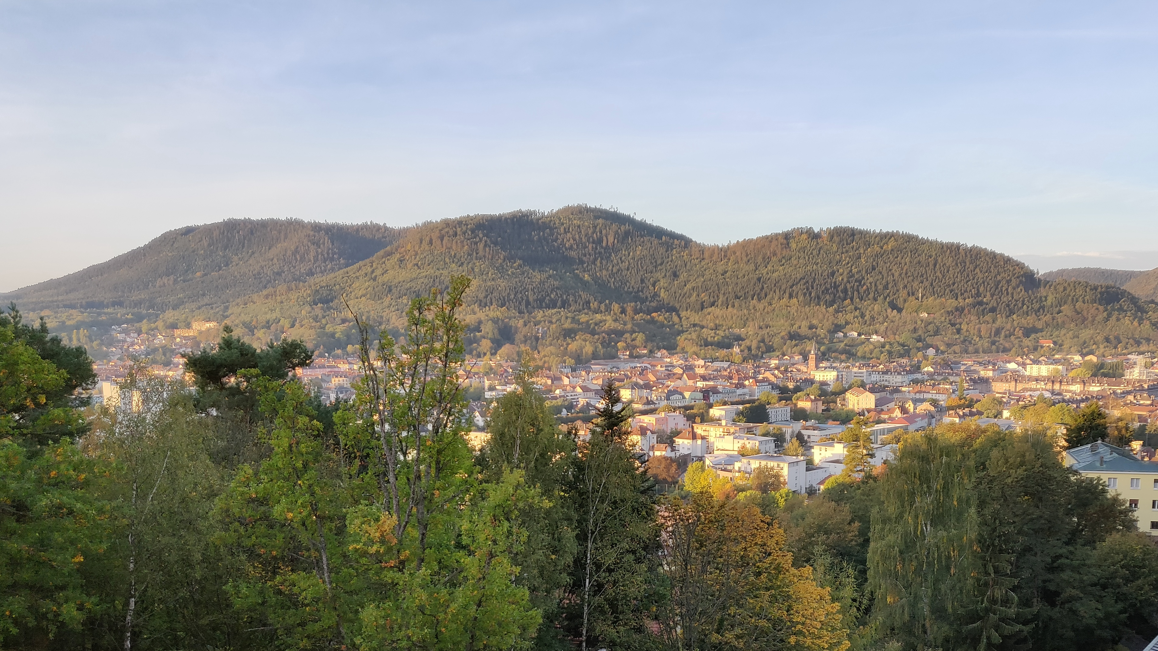 Le centre hospitalier situé en hauteur de la ville, offre une vue sur le centre-ville et les montagnes environnantes.